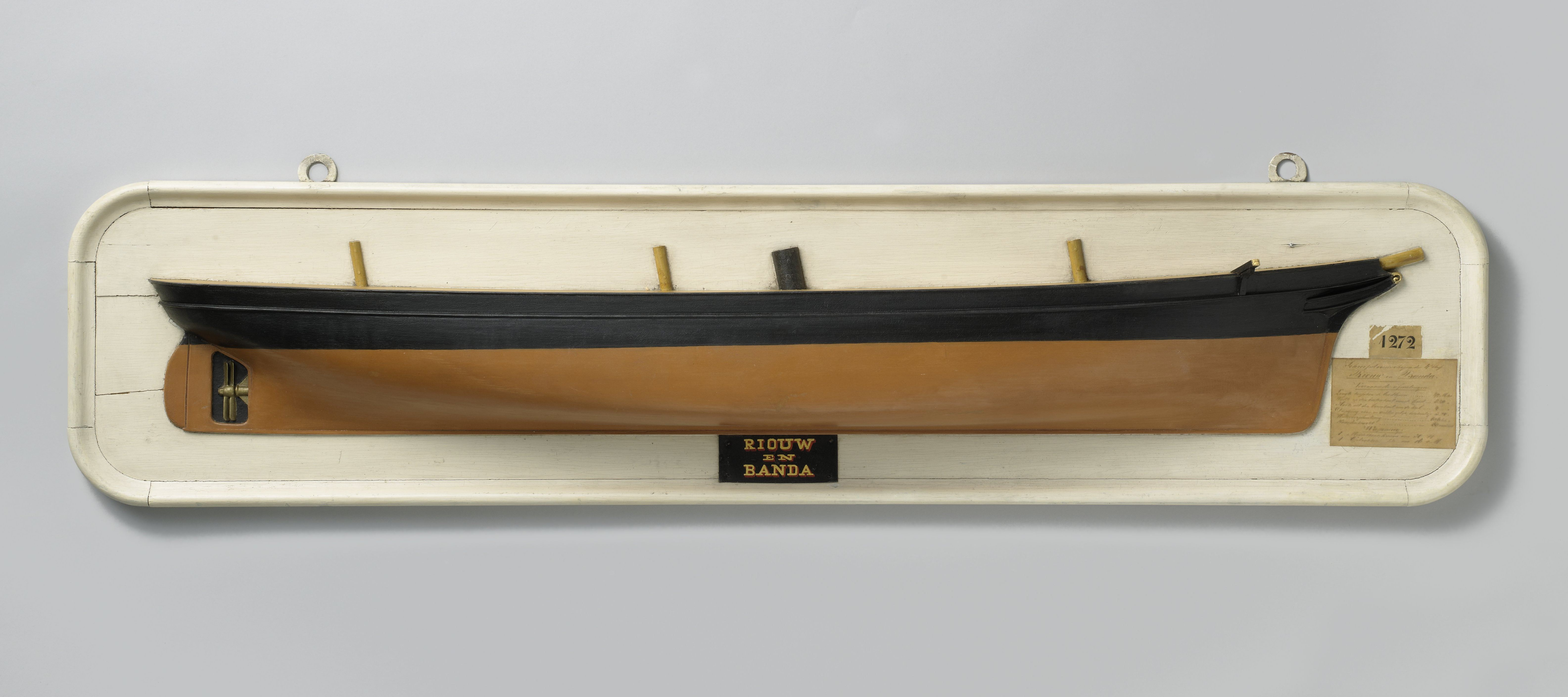 IdentificatieTitel(s): Halfmodel van een schroefstoomschipObjecttype: scheepsmodel halfmodel werfmodel Objectnummer: NG-MC-1272Opschriften / Merken: opschrift, midden onder, op een rechthoekig zwart label: ‘RIOUW / EN / BANDA’opschrift, rechtsonder, op een stuk papier, in inkt: ‘Schroefstoomschepen der 4de Klasse/ Riouw en Banda. / [followed by measurements and armament]’etiket, midden rechts: ‘1272’, voormalig inventarisnummerOmschrijving: Gepolychromeerd stapelmodel (stuurboord) van een driemast schroefstoomschip. Bijna verticale, rechte voorsteven met galjoen en krul als schegbeeld. Elliptisch hek met Rijkswapen, Mangin-schroef en roer met afgerond roerblad. Het model heeft een schoorsteen. De zeeg loopt op naar beide uiteinden, een reehout. Rondspant. Schaal 1:50 (afgeleid).VervaardigingVervaardiger: modelmaker: Nederlandsche Stoomboot Maatschappij FijenoordPlaats vervaardiging: RotterdamDatering: 1872Fysieke kenmerken: houtMateriaal: hout Techniek: polychromieAfmetingen: h 32 cm. × b 138 cm. × d 13,5 cm. ToelichtingDe schroefstoomschepen 4de klasse van 3 stukken Riouw en Banda, lang 42 m, werden beide bij de Nederlandsche Stoomboot Maatschappij Fijenoord gebouwd in 1872. Beide waren composiet gebouwd en bestemd voor dienst in Oost-Indië. De Banda nam deel aan de Salamangan-expeditie in 1877, en nam in 1890 de functie van opnemingsvaartuig over van de Hydrograaf; afgekeurd en uit dienst gesteld in 1899 en bestemd als werkvaartuig bij de bouw van de vuurtoren op de Aroebank. De Riouw bracht op 21 februari het in beslaggenomen, onder Nederlandse vlag varende ss. Hoth-an naar Oleh-leh op; uit dienst en afgekeurd te Soerabaja in 1886 en verkocht.OnderwerpWie: Banda (schip)Riouw (schip)Verwerving en rechtenVerwerving: overdracht van beheer 1883Copyright: Publiek domein